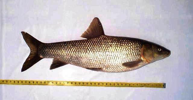 Himri, Carasobarbus luteus (= Barbus luteus)